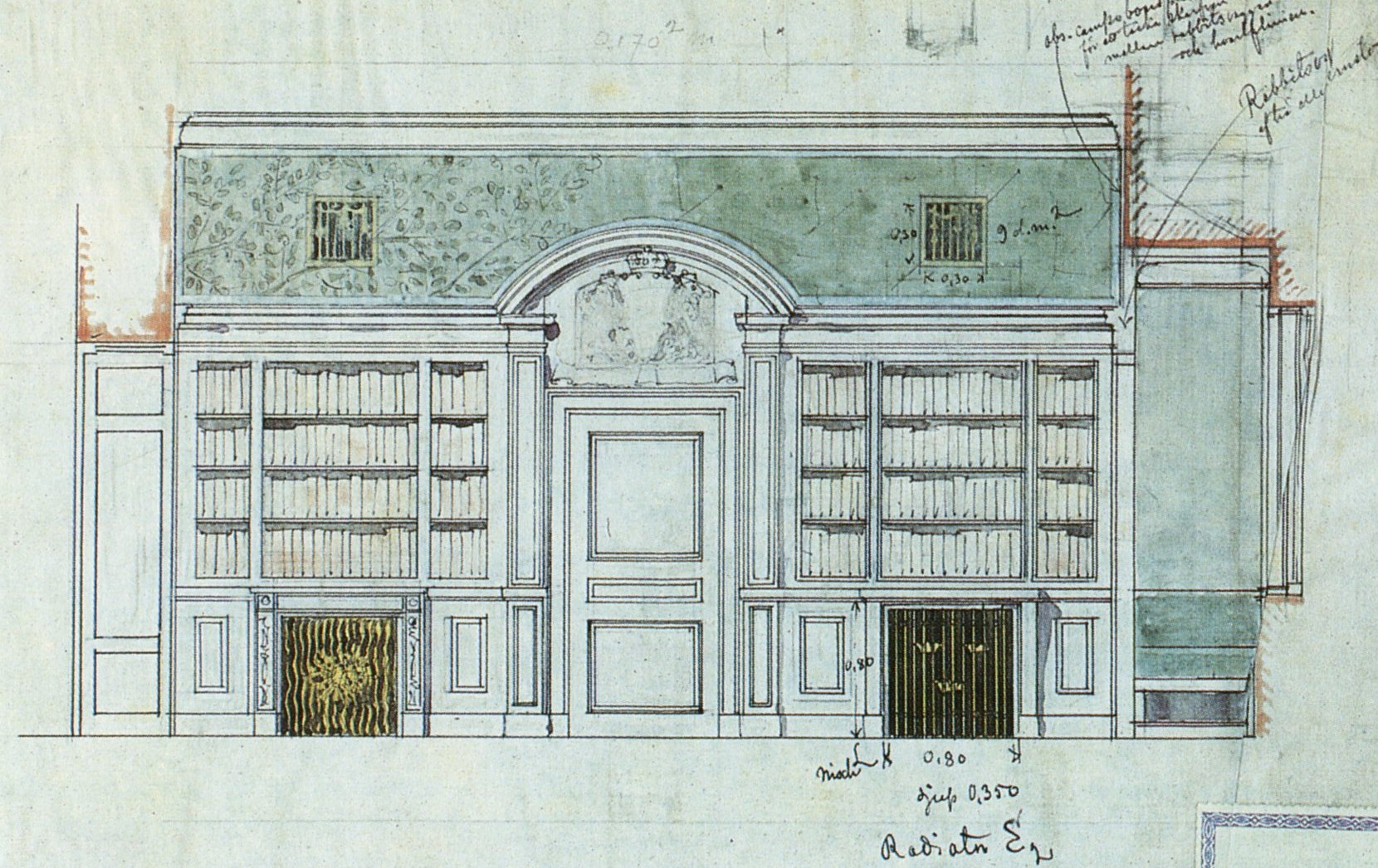 Inredningsskiss för nya Riksdagshuset i Stockholm